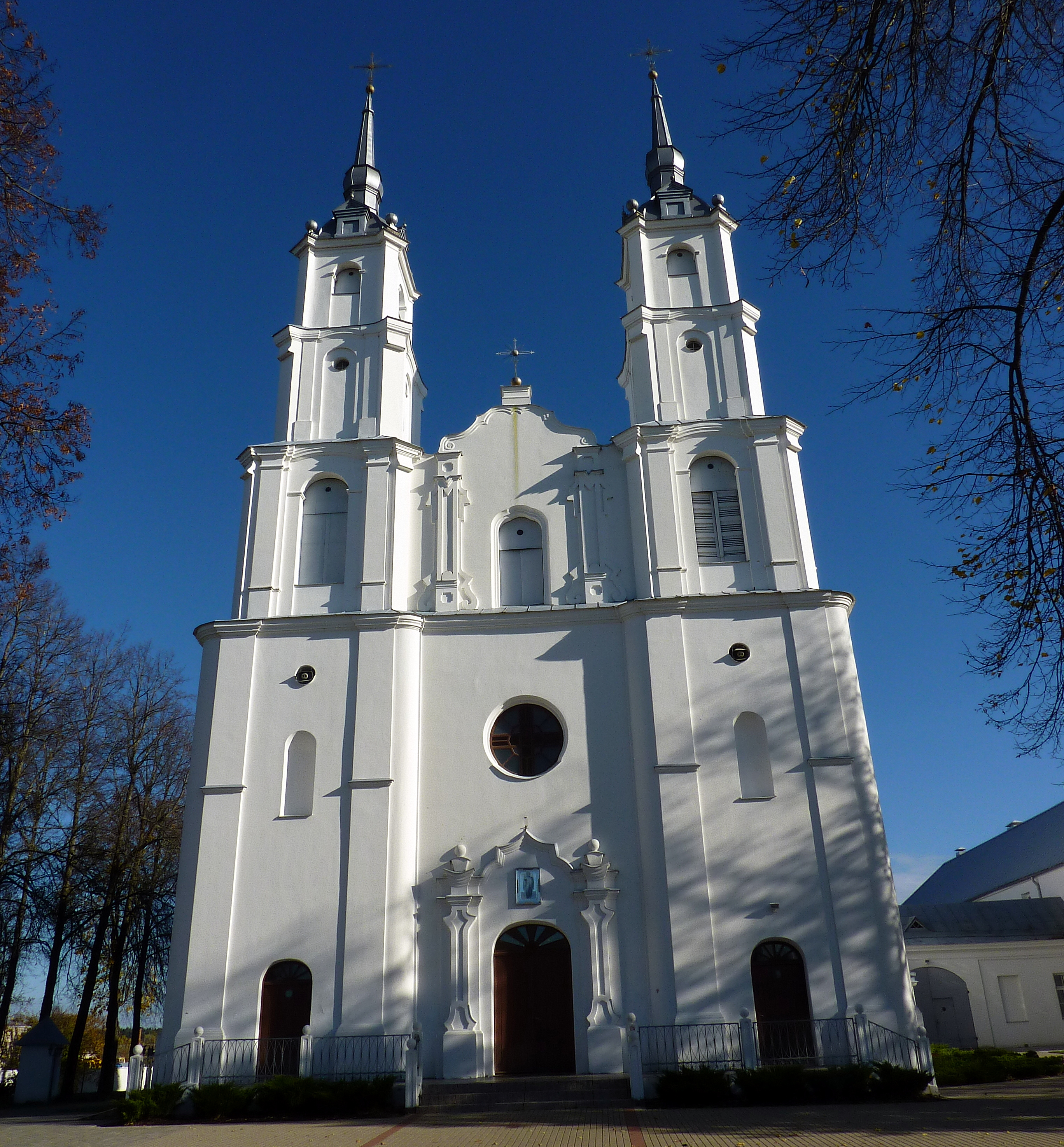 Wielony - kościół rzymskokatolicki p.w. św. Michała Archanioła